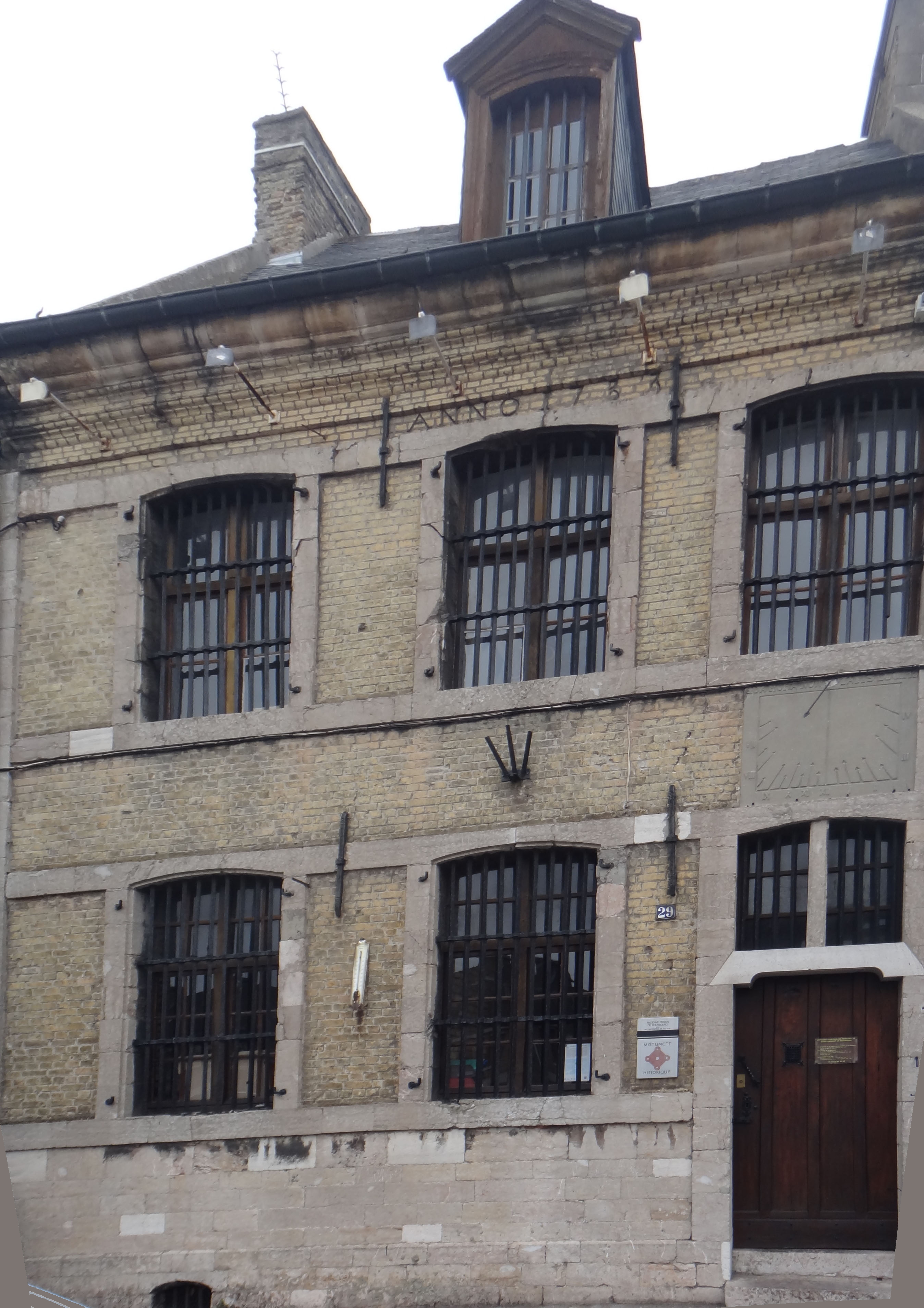 Hospice Saint-Jean